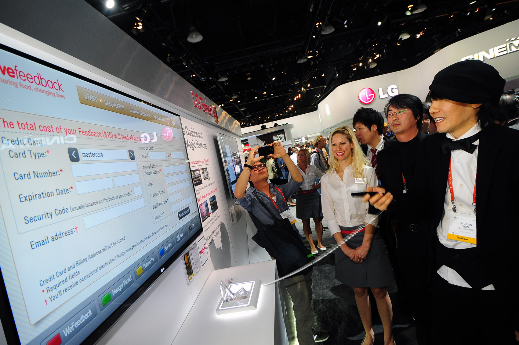 가수 김장훈씨가 현지시각 11일 미국 라스베이거스에서 열리고 있는 '2012 CES'를 찾아 LG전자 부스에서 시네마 3D 스마트 TV, '시네마 스크린' 디자인, 84인치 3D UDTV 등을 관람했다. 김장훈씨가 'LG 시네마3D 스마트TV’로 기아 및 빈곤 구제를 위한 기부에 동참할 수 있는 ‘WeFeedBack’ 앱을 시연해 보고 있다. 전세계 80여 개국 LG전자 스마트TV 사용자들은 LG 앱스토어에서 ‘WeFeedBack’ 앱을 내려받아 기아, 빈곤 관련 뉴스와 동영상을 시청하고, 실제 기부를 위한 신용카드 결제까지 원스톱으로 진행할 수 있다. ※ LG전자 뉴스룸 에서 관련 보도자료를 확인실 수 있습니다.